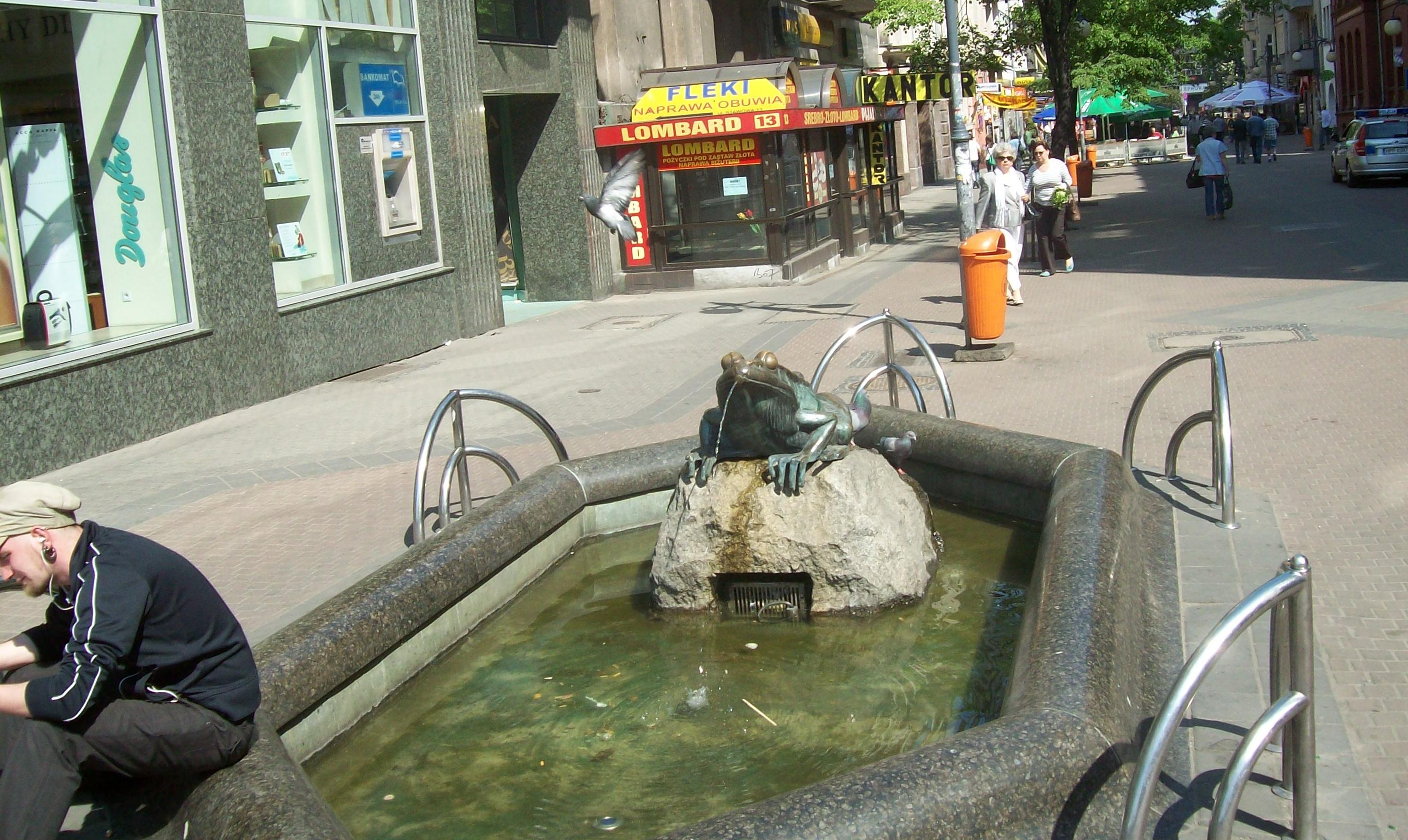 Fontanna "Żaba" na ul. Stawowej w Katowicach